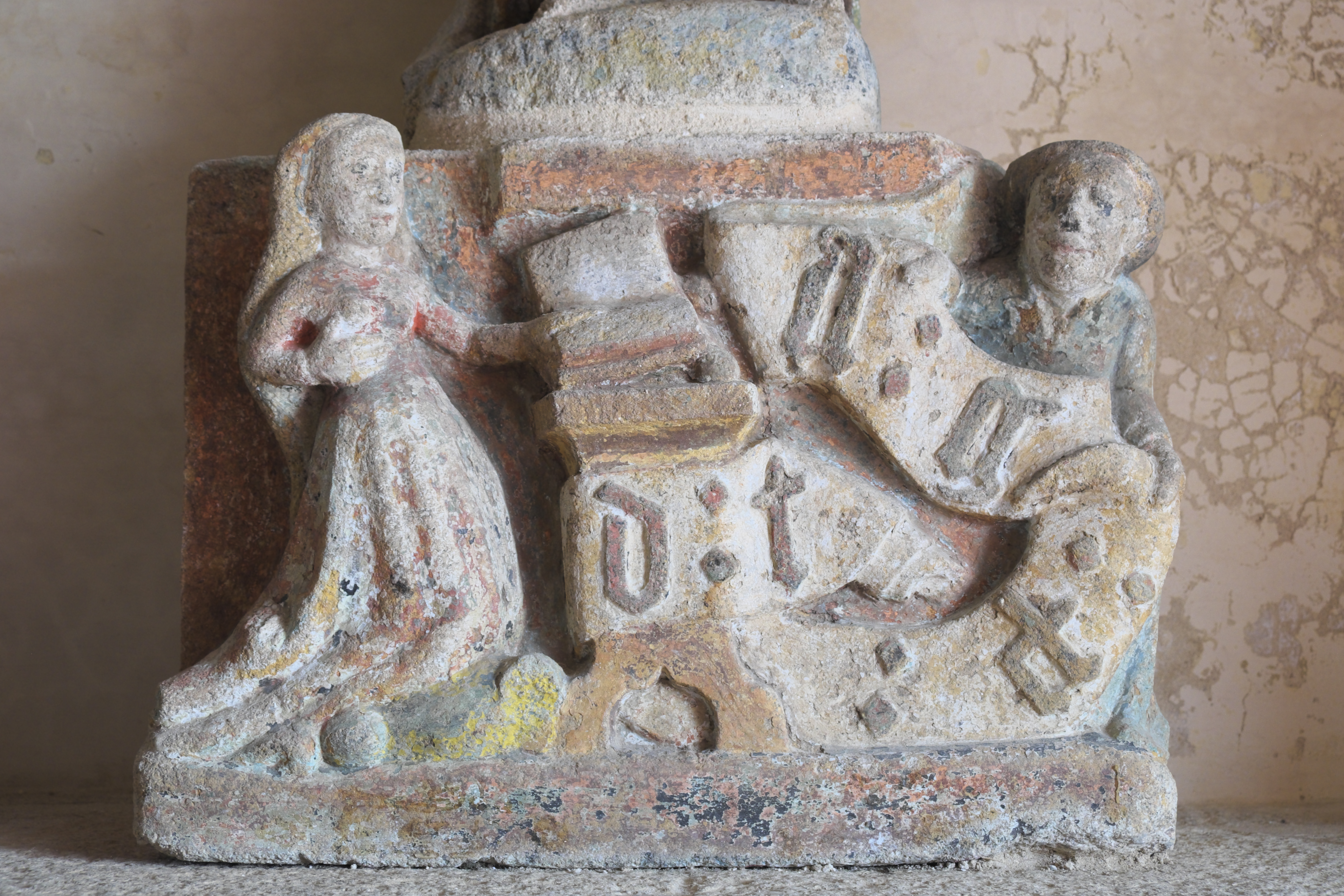 Katholische Pfarrkirche Ste-Trinité (Dreifaltigkeitskirche) in Calan im Département Morbihan (Region Bretagne/Frankreich), Madonnenfigur und Relief der Verkündigung (Ausschnitt)